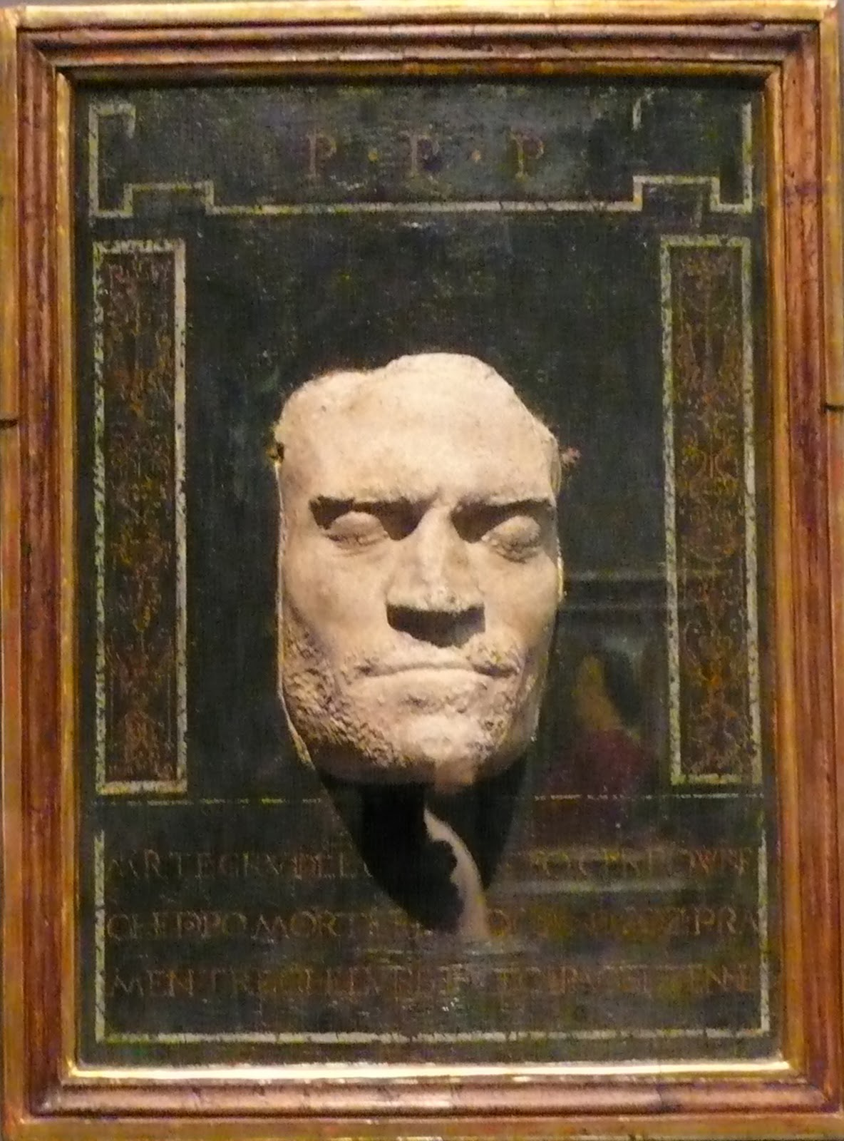 Lorenzo hat sich nie malen lassen, daher ist dies - außer einer Kamee - die einzige Abbildung seines Gesichts auf einem eigenständigen Medium und kann als frühes Beispiel eines politischen Personenkultes angesehen werden. Die Tafel wurde zum Zwecke seiner posthumen Verehrung angefertigt.